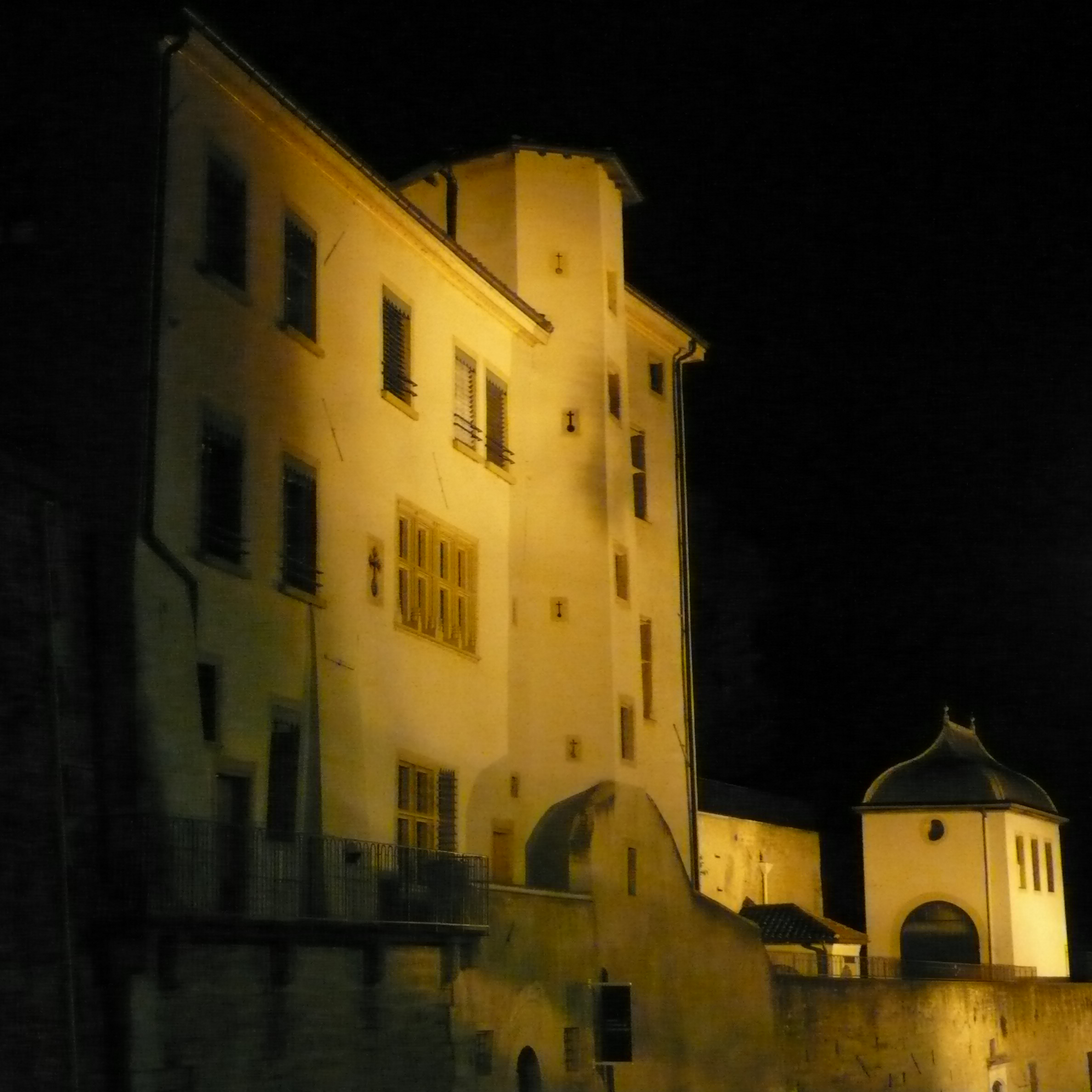 Maison de Lorette où vécut Pauline Jaricot, propriétè des Œuvres Pontificales Missionnaires. Inscrite à l’inventaire supplémentaire des monuments historiques en 2003, elle a été restaurée entre 2002 et 2005. Adresse: 42 et 42 bis, montée Saint-Barthélemy - F-69005 Lyon.